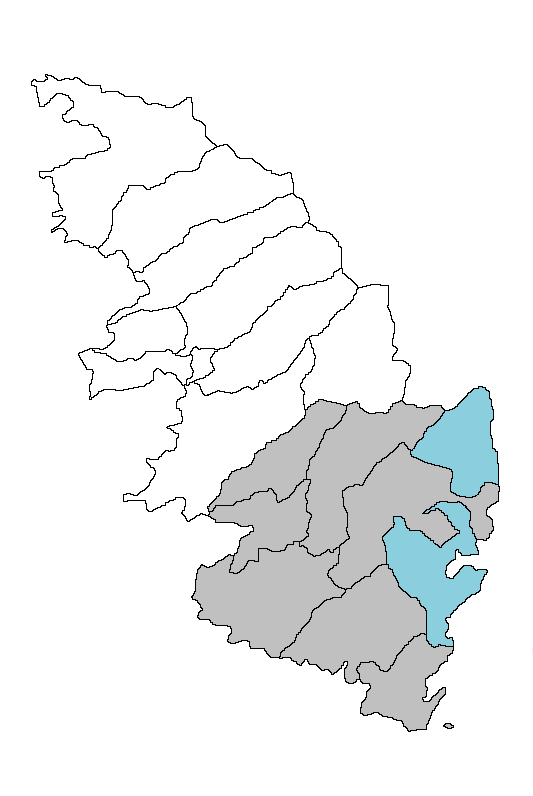 Carte de la Corse du Sud avec le découpage cantonal et la lise en relief de l'arrondissement de Sartène et du canton de Porto-Vecchio